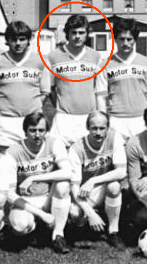 Title: Mannschaftsfoto BSG Motor Suhl Factual corrections and alternative descriptions are encouraged separately from the original description. Additionally errors can be reported at this page to inform the Bundesarchiv. Original historic description: ADN-ZB Schaar 16.6.84 Suhl: Aufsteiger zur Fußball-Oberliga 1984-85: BSG Motor Suhl. Einen Spieltag vor Abschluß der Aufstiegsrunde sicherte sich die BSG Motor Suhl einen der beiden freien Plätze in der Fußball-Oberliga. Die Thüringer spielen damit in der nächsten Serie erstmals in der höchsten DDR-Fußballklasse. Hintere Reihe v.l.n.r.: Trainer Paul Kersten, Wolfgang Reuter, Peter Staps, Hartmut Weiß, Andreas Böhm, Roman Seyfarth, Andreas Schneider, Dieter Kurth, Klaus Schröder, Matthias Brückner, Erhard Mosert, Gerd Schellhase, Mannschaftsleiter Frank Hoffmann und Trainer Ernst Kurth. Vordere Reihe v.l.n.r.: Masseur Peter Eichelbrenner, Klaus Semineth, Dieter Erhardt, Jürgen Schneider, Torhüter Walter Jänicke, Torhüter Klaus Müller, Ralf Eismann, Uwe Jertschewski, Uwe Trömel und Trainer Burkhardt Winkler.